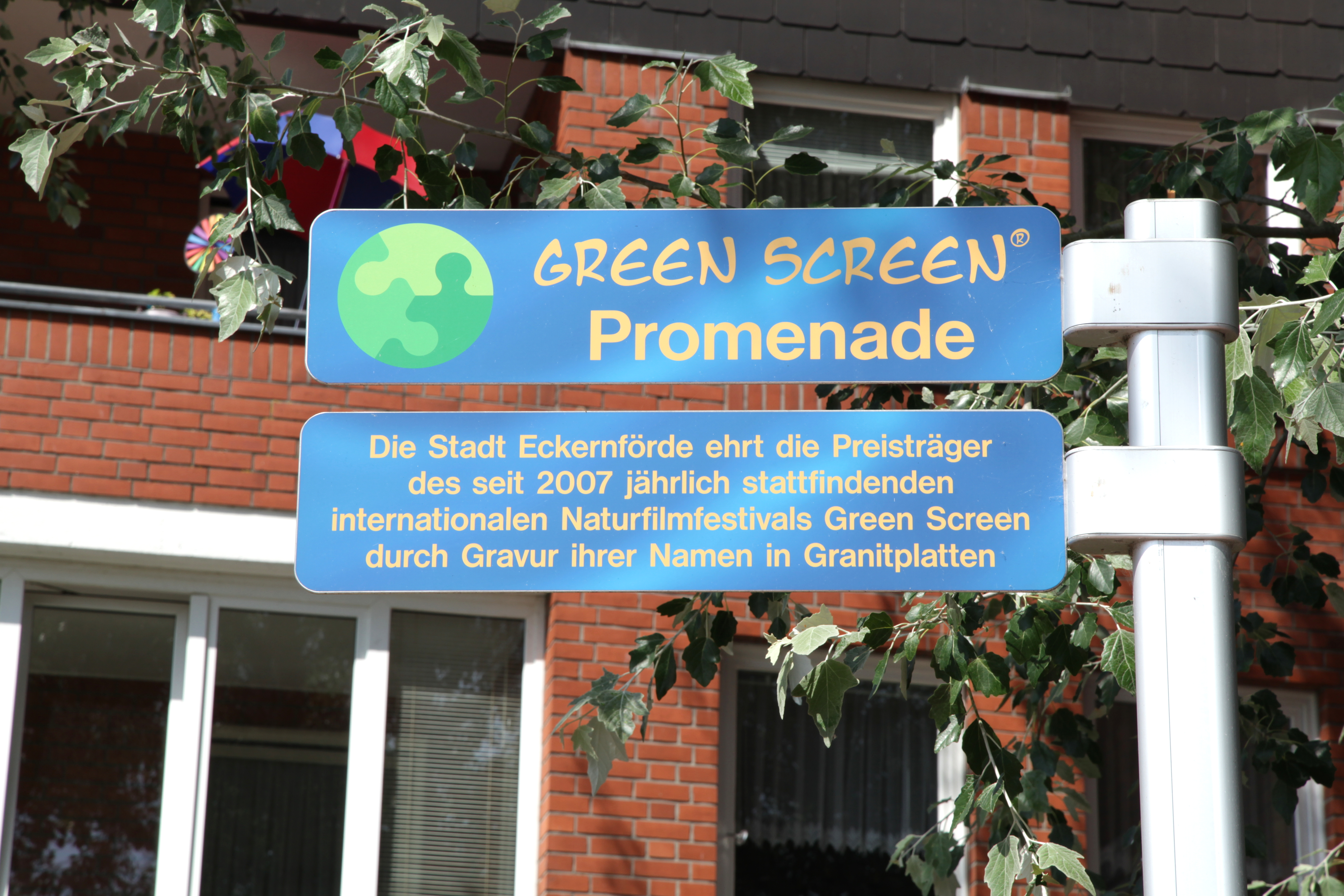 Green Screen Promenade als nördlicher Teil der Strandpromenade in Eckernförde